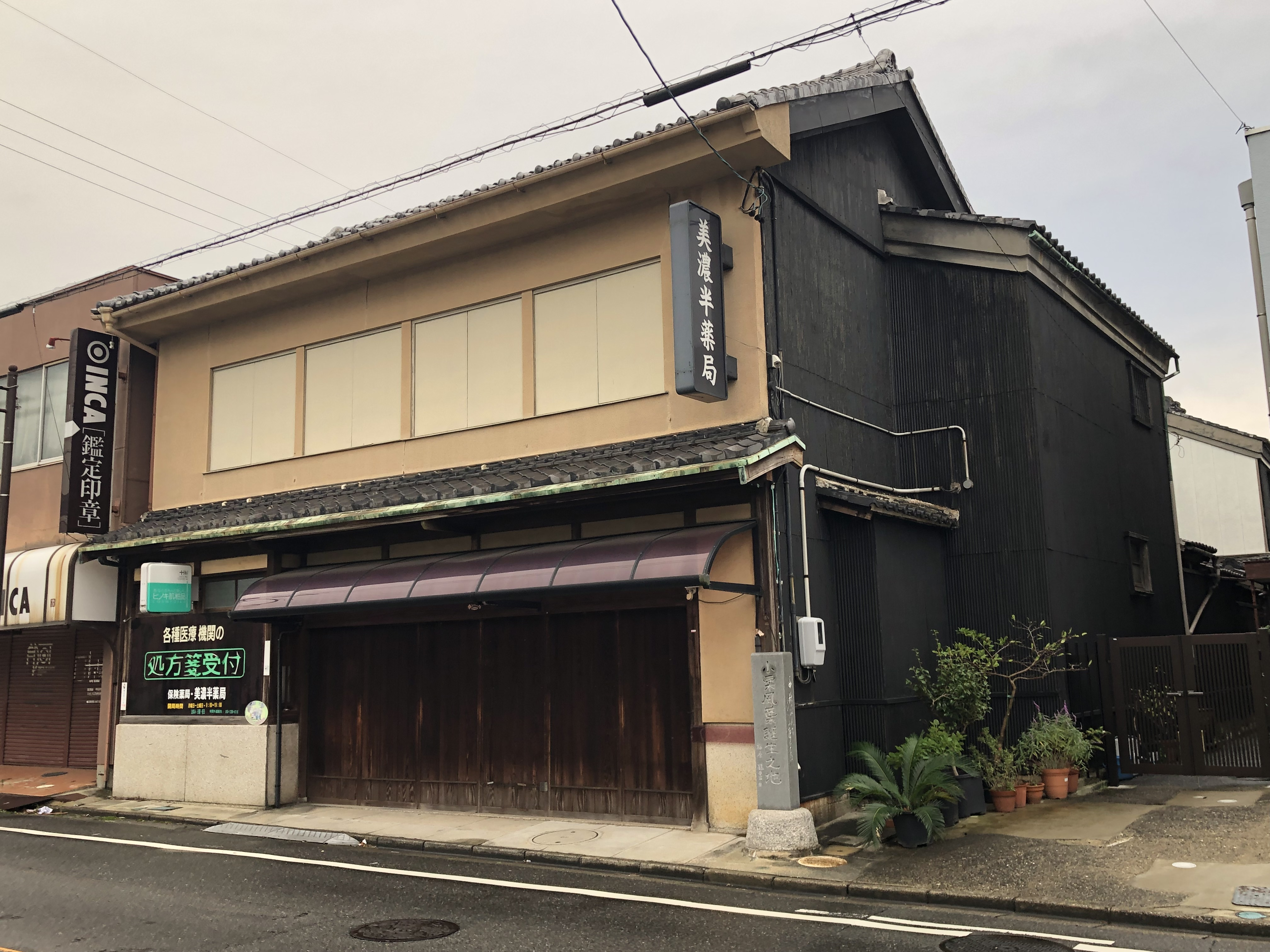 近代日本の小説家・小栗風葉（1875-1926）が生まれた場所。実家は菜種商から薬局に転業したものの健在。薬局の傍らの碑は、妹の義理の息子に当たる哲学者・梅原猛が建てたもの。